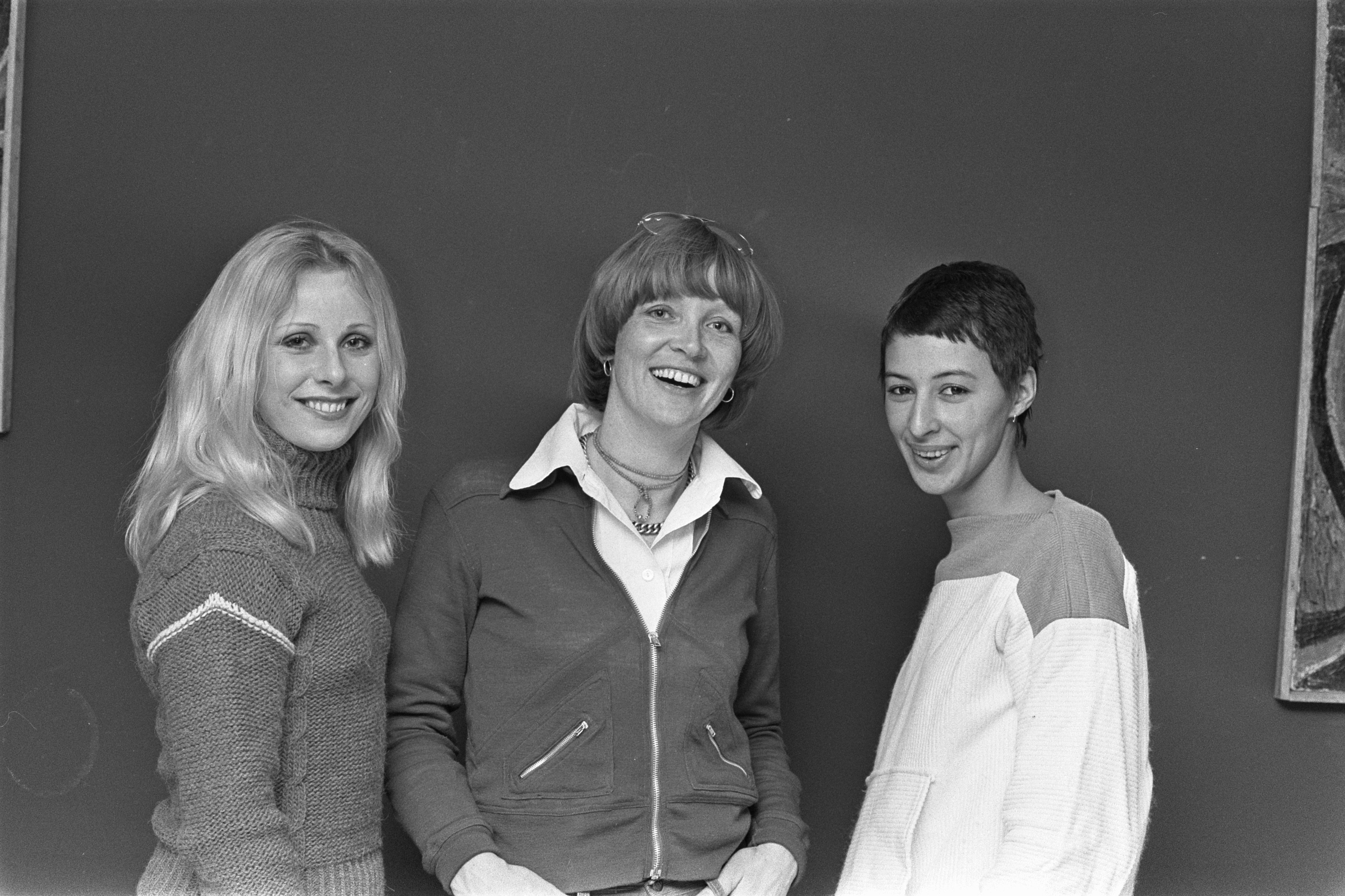 Collectie / Archief : Fotocollectie Anefo Reportage / Serie : [ onbekend ] Beschrijving : Repetities Nationaal Songfestival 1977 ; v.l.n.r. Bonny St. Clair , presentatrice Ati Dijckmeester en Heddy Lester Datum : 2 februari 1977 Trefwoorden : zangeressen Fotograaf : Bogaerts, Rob / Anefo Auteursrechthebbende : Nationaal Archief Materiaalsoort : Negatief (zwart/wit) Nummer archiefinventaris : bekijk toegang 2.24.01.05 Bestanddeelnummer : 929-0055